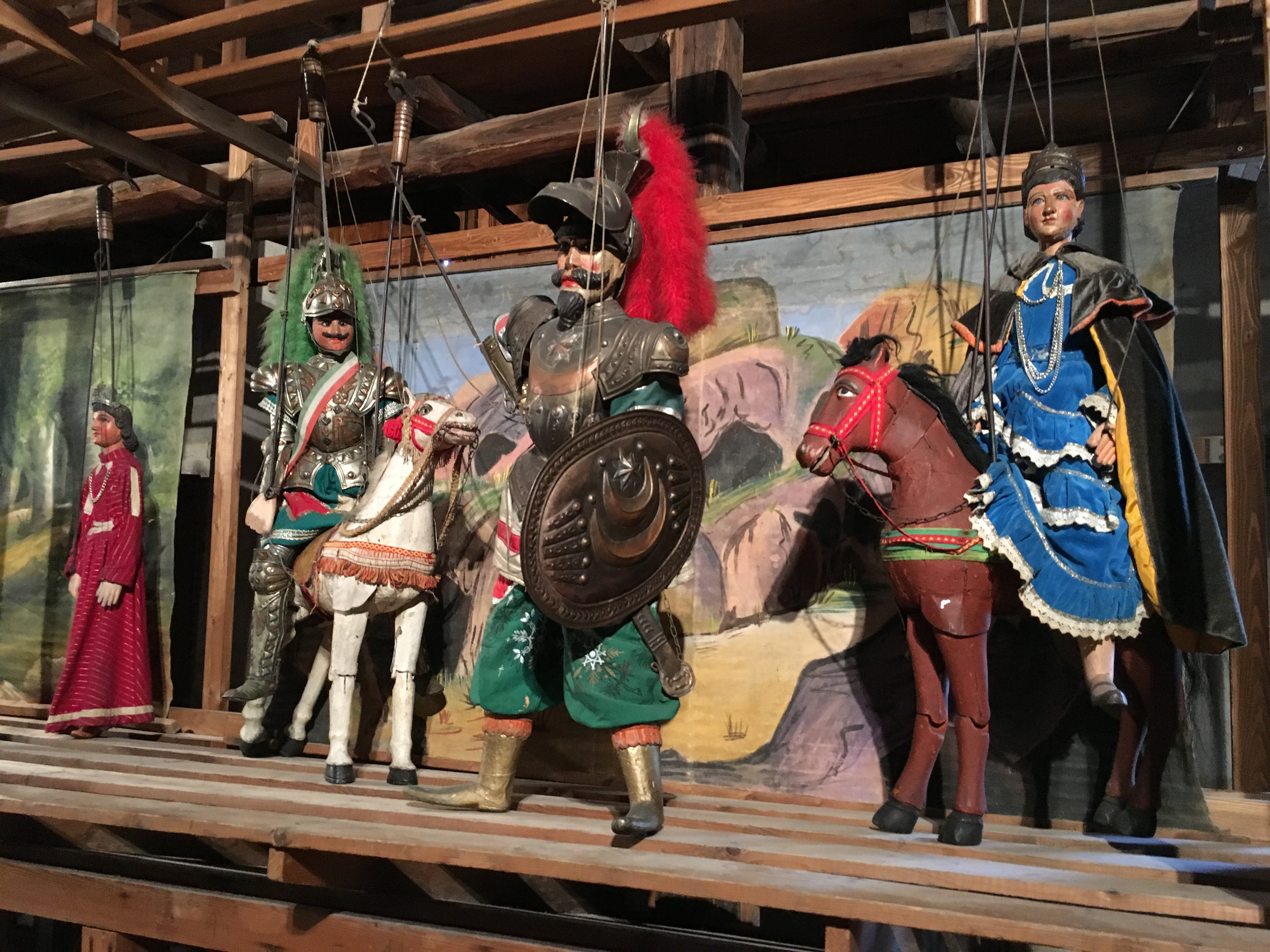 Palazzo Branciforte. Palermo